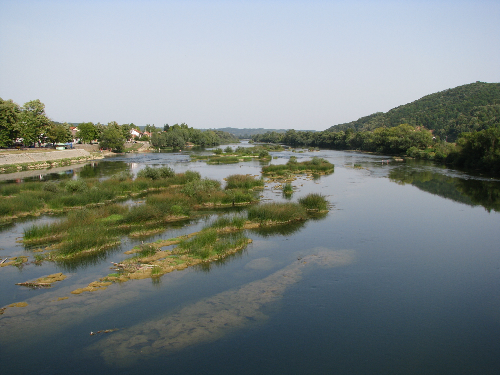 Rijeka Una u Hrvatskoj Kostajnici